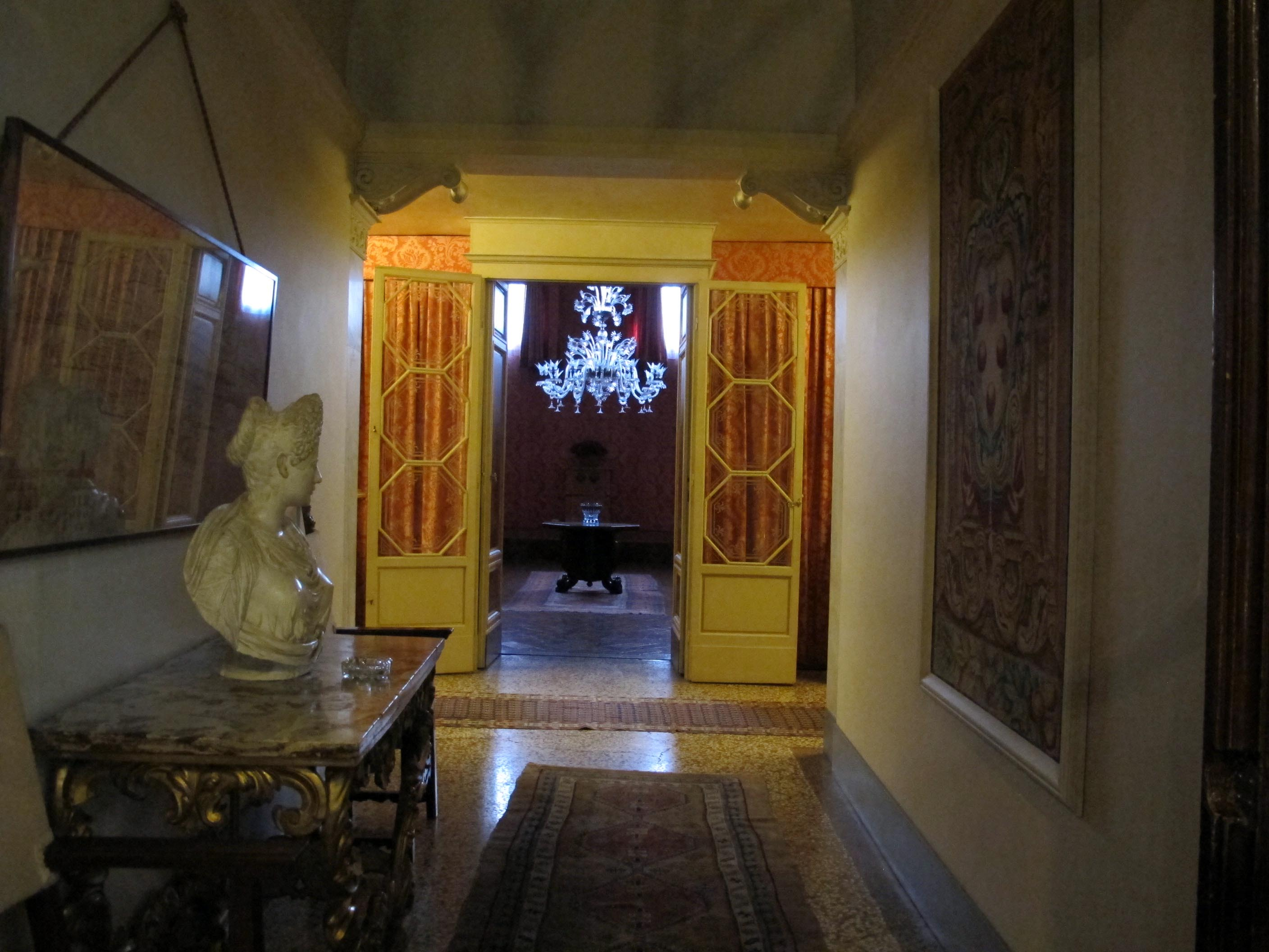 Palazzo di ubaldino peruzzi, fi, interno